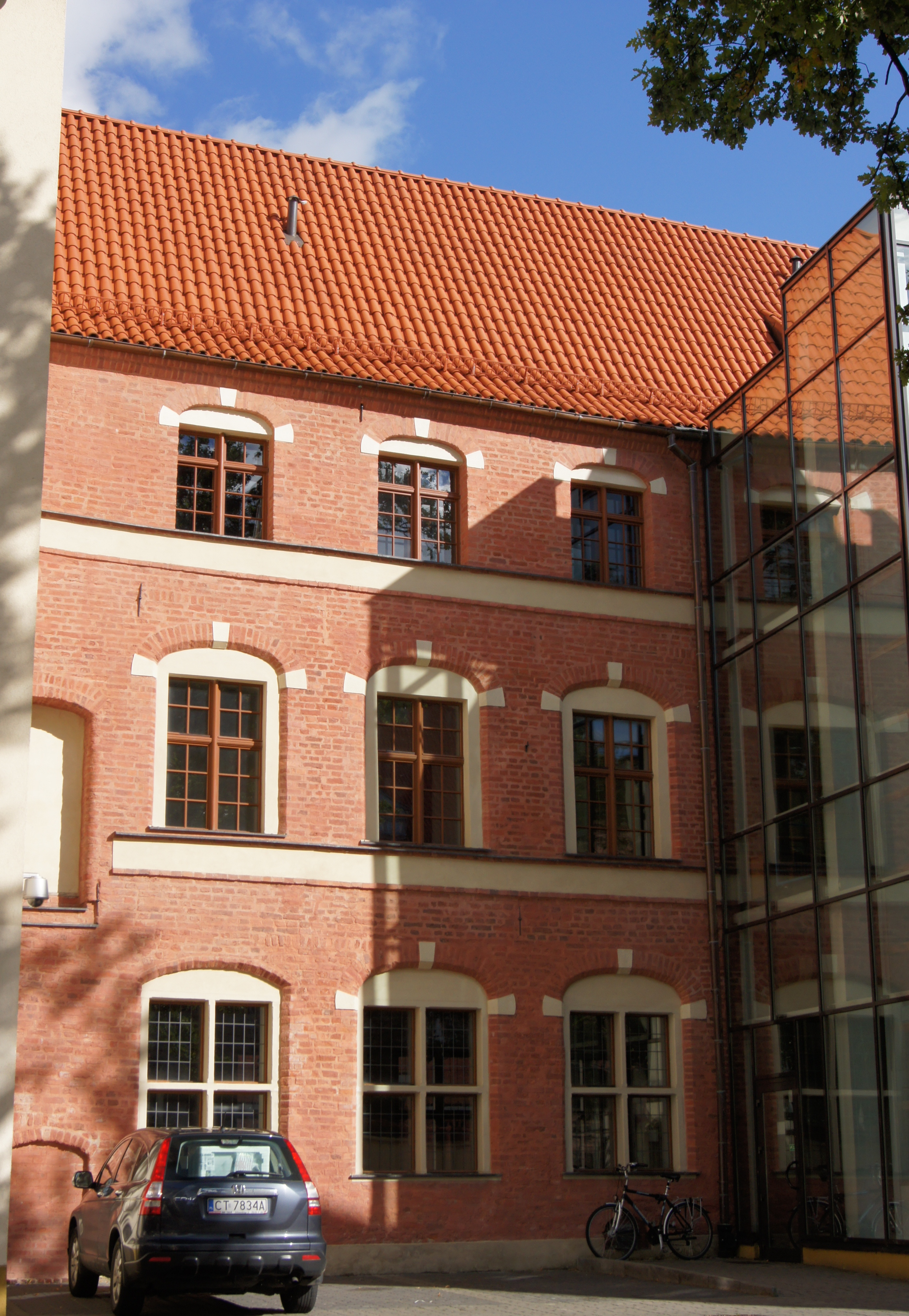 Toruń, ul. Piekary 49 - widok od podwórza